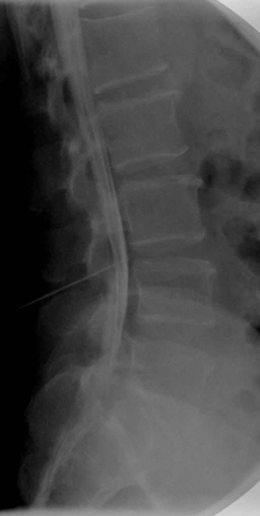 Caudografie.